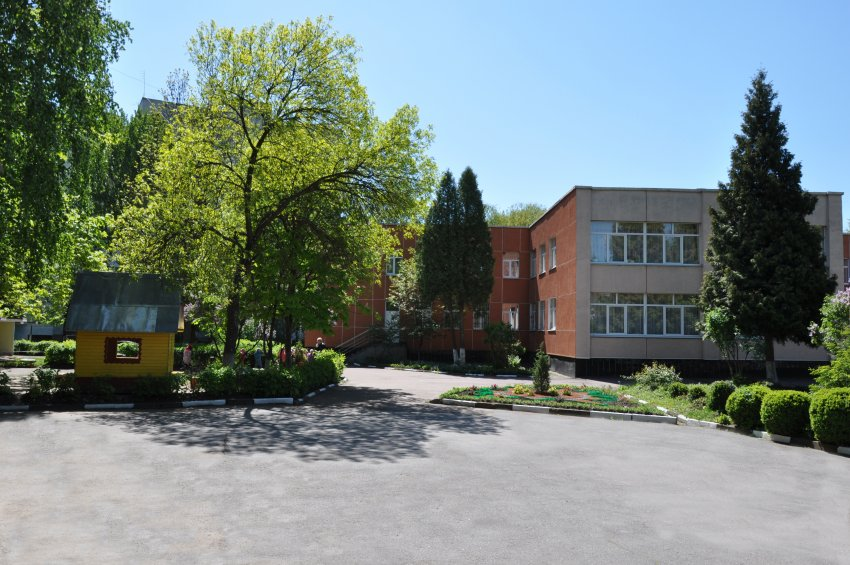 ДНЗ Росинка